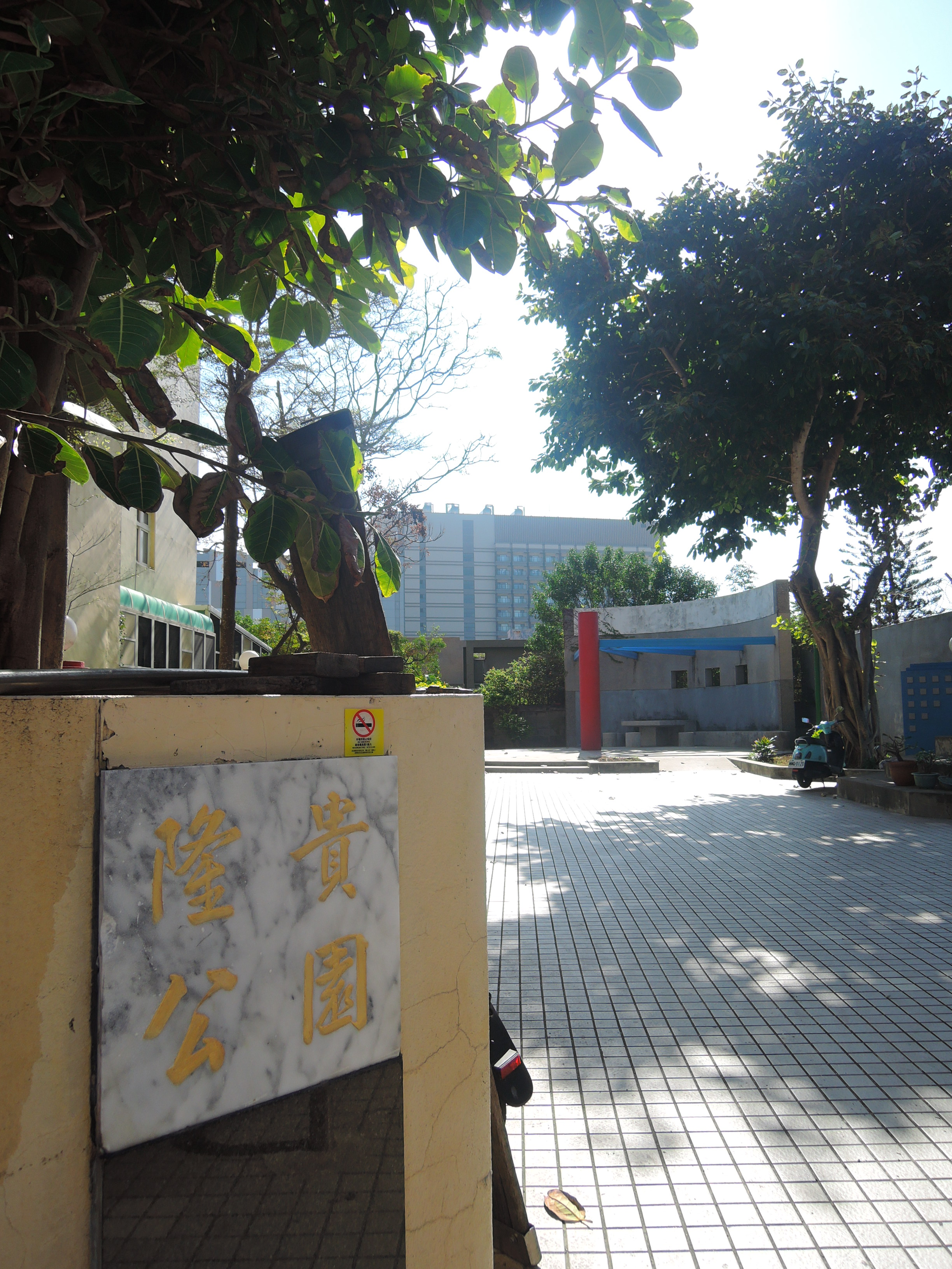 澎湖縣馬公市新村路與新生路交界處，鄰近一新社聖真寶殿